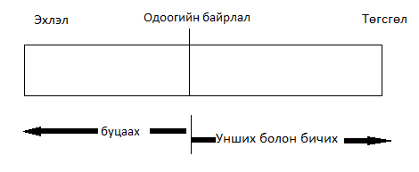 Монгол:  Дэс дараалсан хандалт